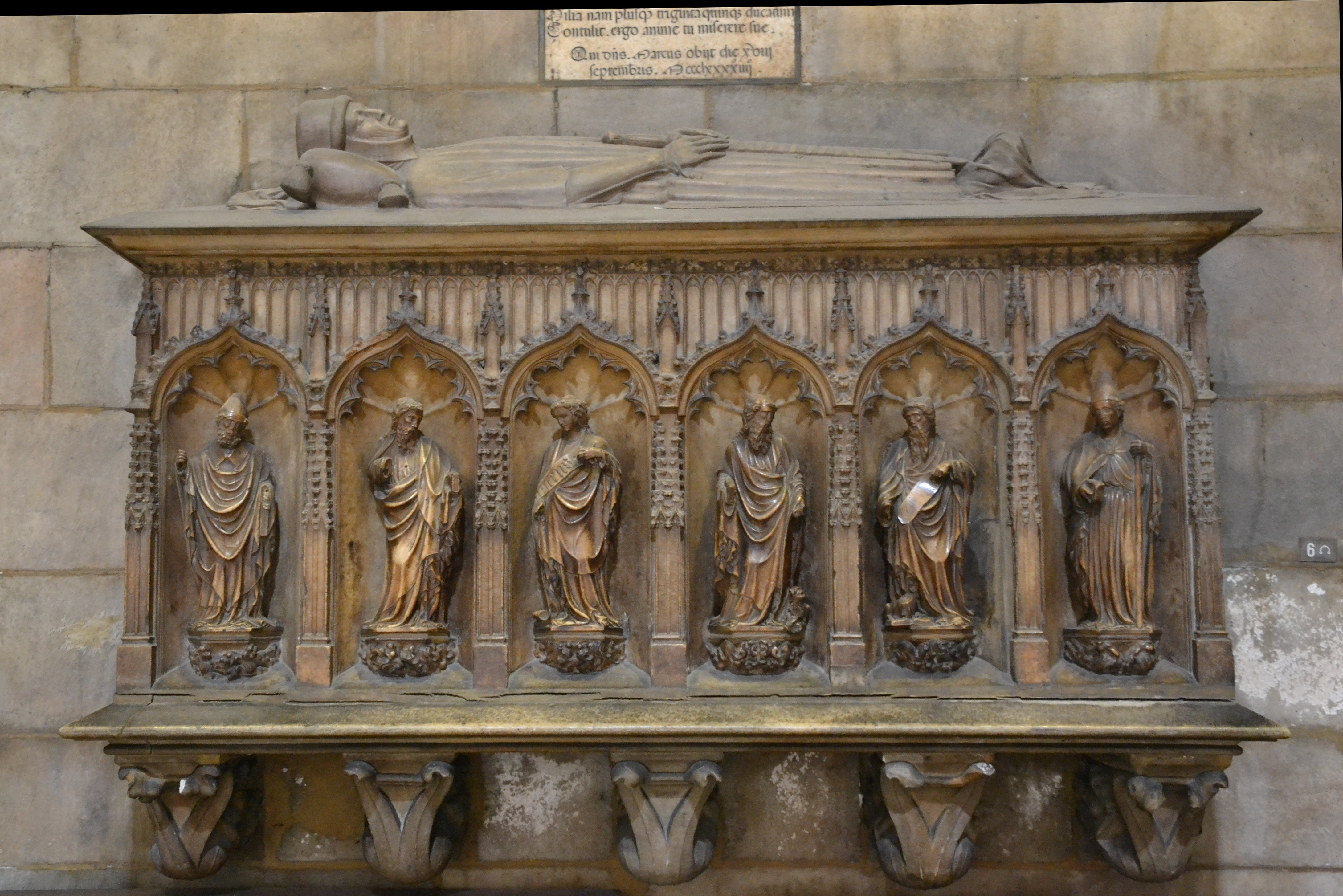 Duomo di Milano. La tomba di Marco Carelli, 1406 Filippino degli Organi; Jacopino da Tradate